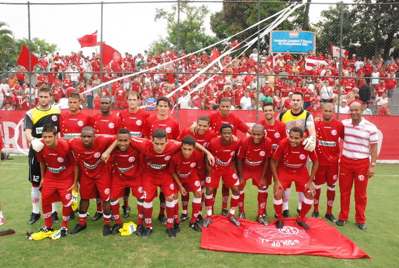 Time do América em 2009. Foto de Carlos Silva.